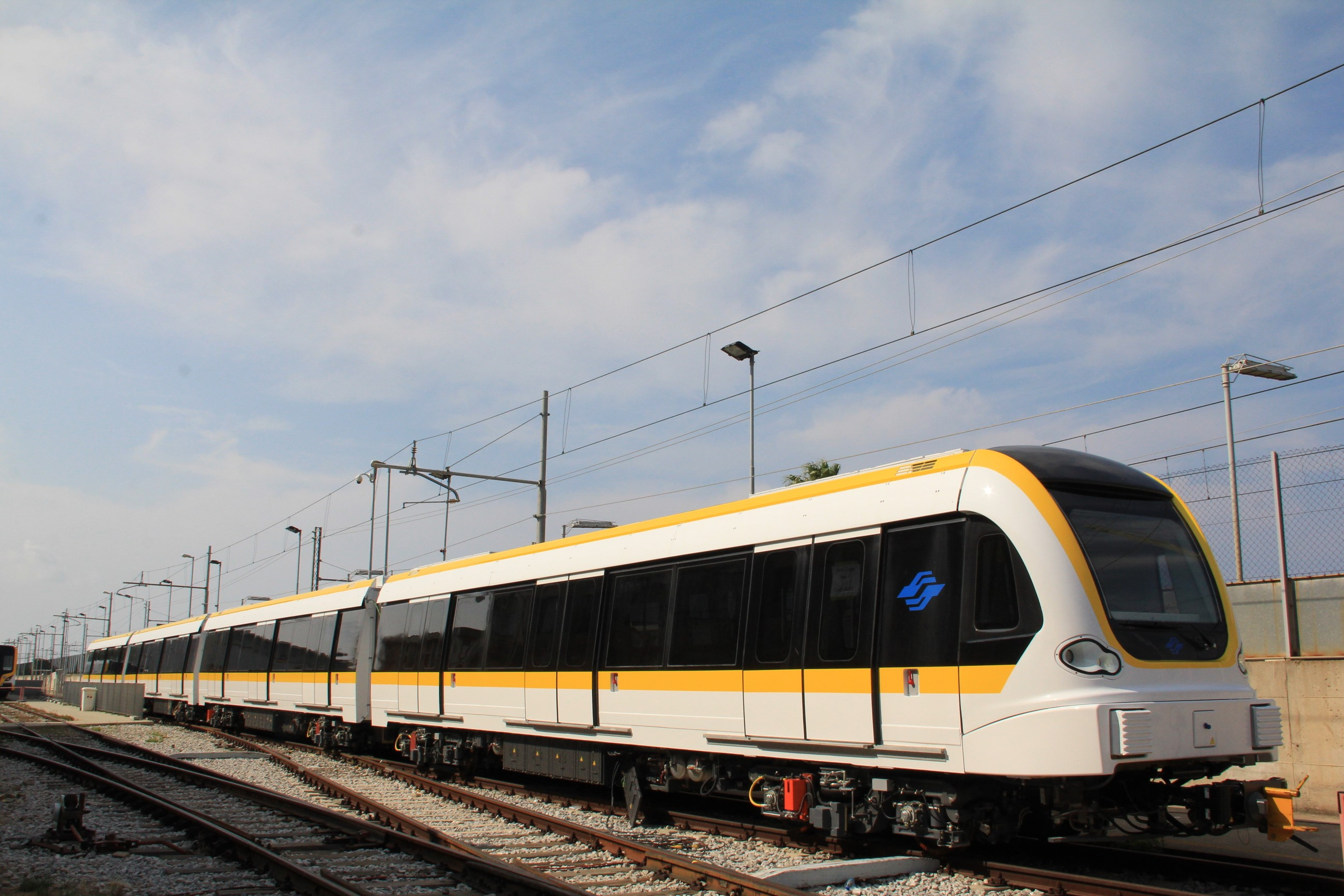 中文（台灣）: 台北捷運環狀線電聯車，照片由新北市政府捷運工程局拍攝。